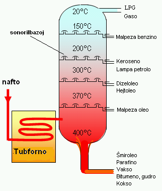 Esperantigo de :Dosiero:Crude Oil Distillation.png